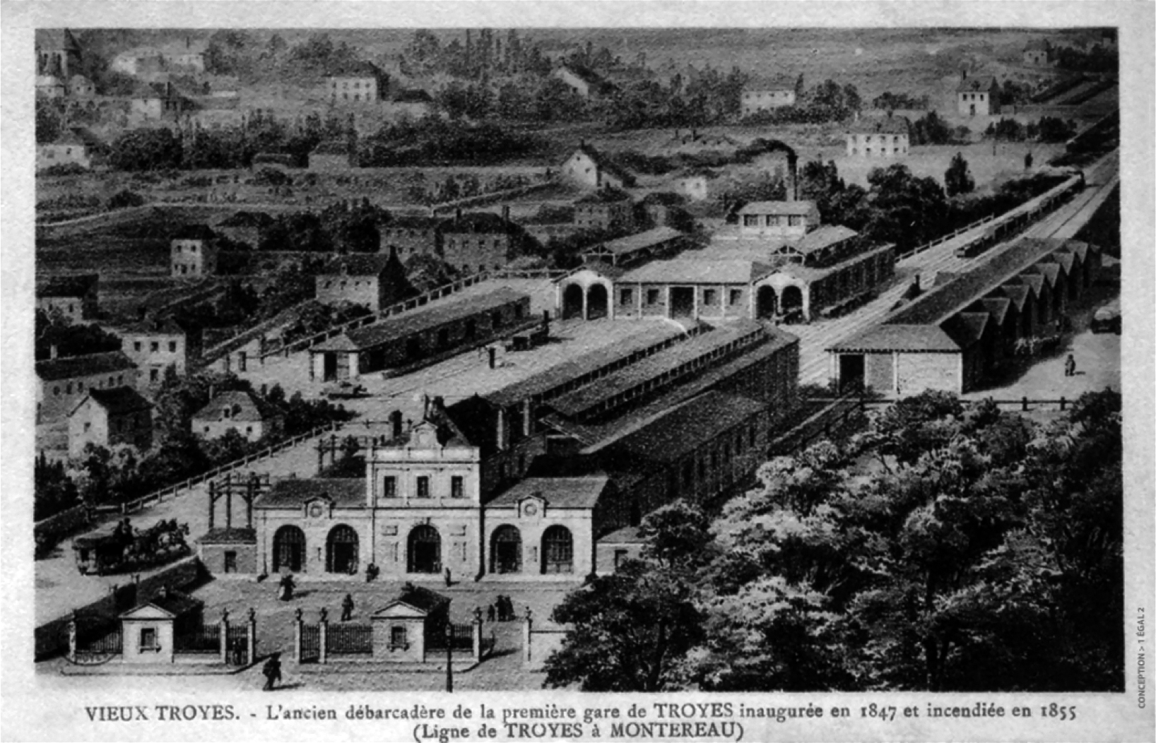 L'embarcadère de Troyes construit en 1847 et mis en service en 1848. incendié en 1855 après avoir été désaffecté du fait du déplacement de la gare. Il devient une école (Collège Pithou) de 1861 à 1978. Au début des années 1990 le site est restructuré en un espace culturel (Espace Argence) qui a conservé une partie de sa façade d'origine de la gare.